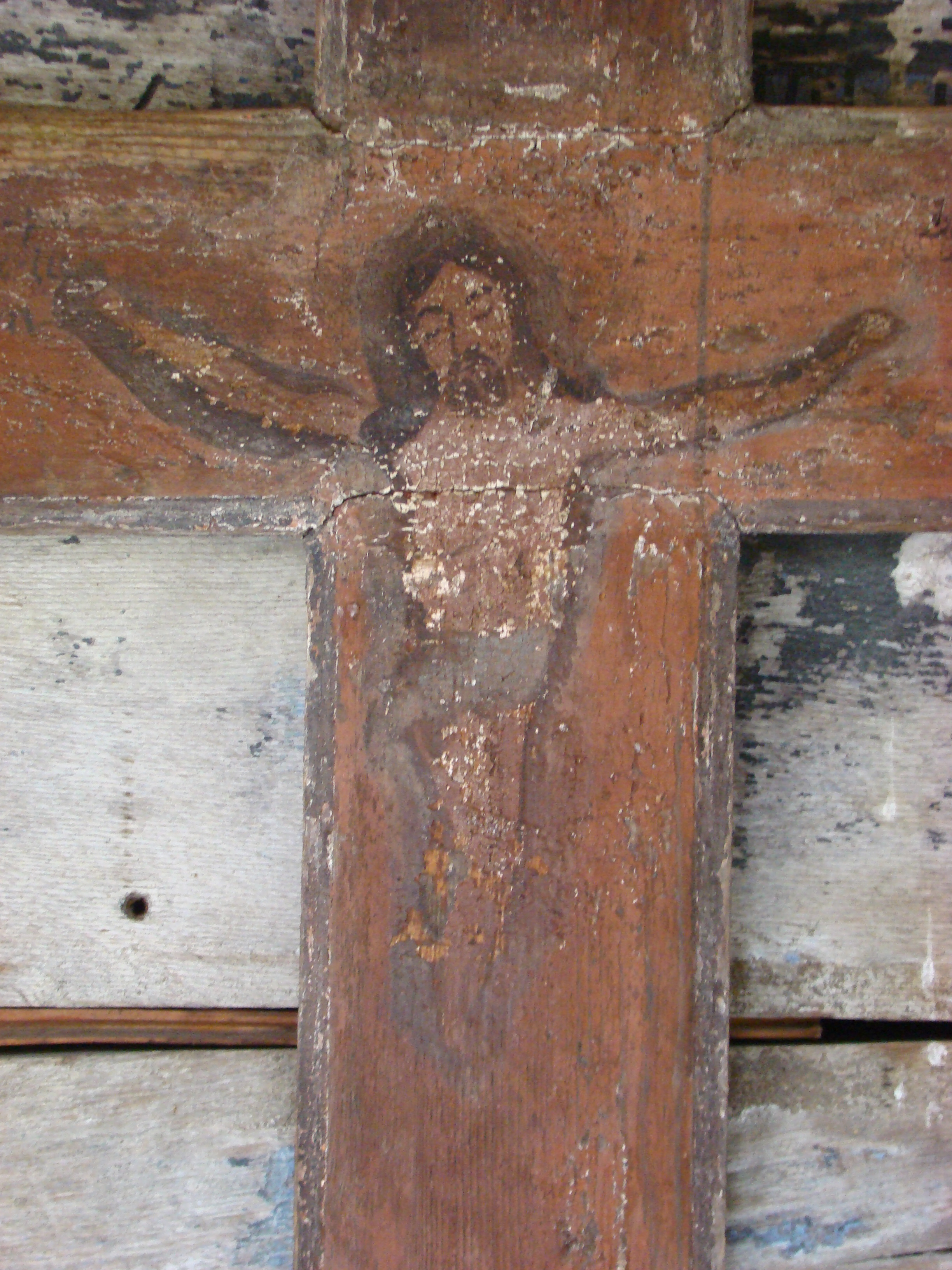 Biserica de lemn "Adormirea Maicii Domnului" a mănăstirii Bic, strămutată din satul Stâna